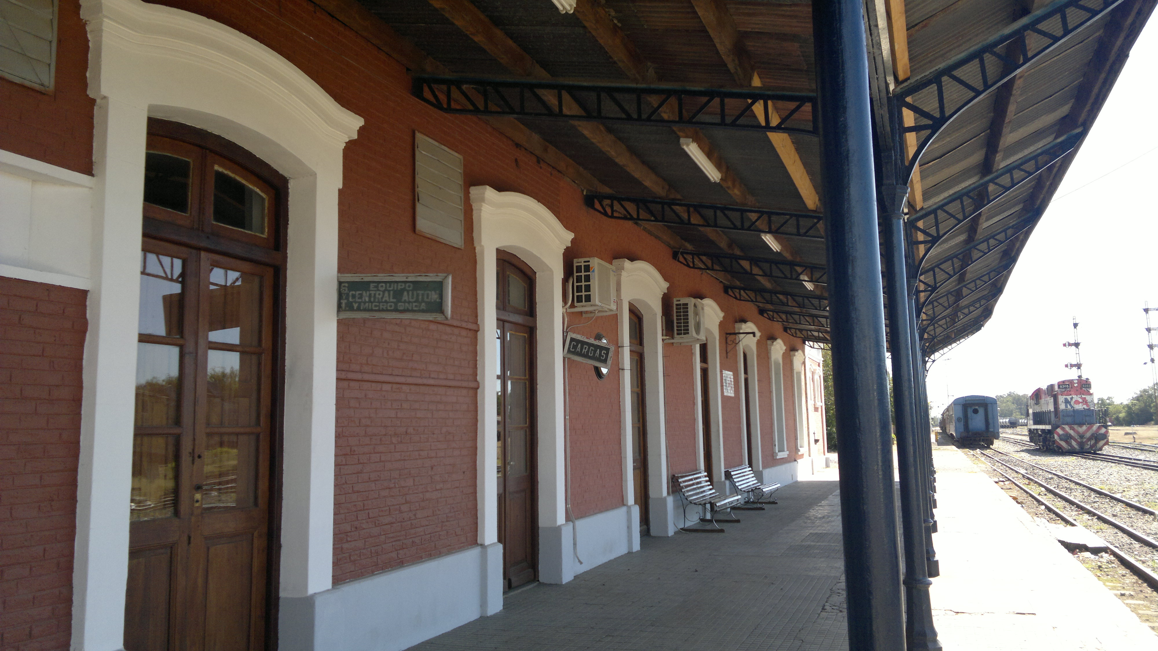 Estación Villa Diego. (FCRPB) Rosario - Puerto Belgrano. Villa Gobernador Gálvez, Provincia de Santa Fe, República Argentina.